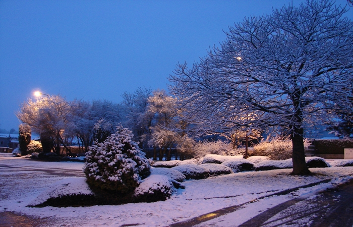 Un matin de neige en 2015